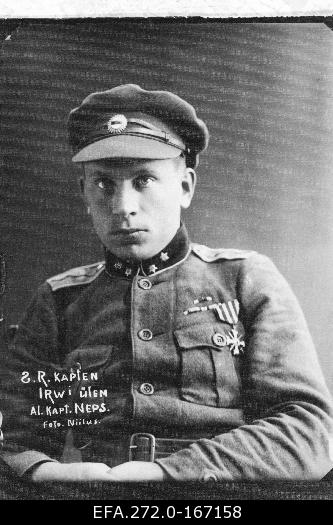 Soomusrongi "Kapten Irv" komandant alamkapten Eduard Neps.